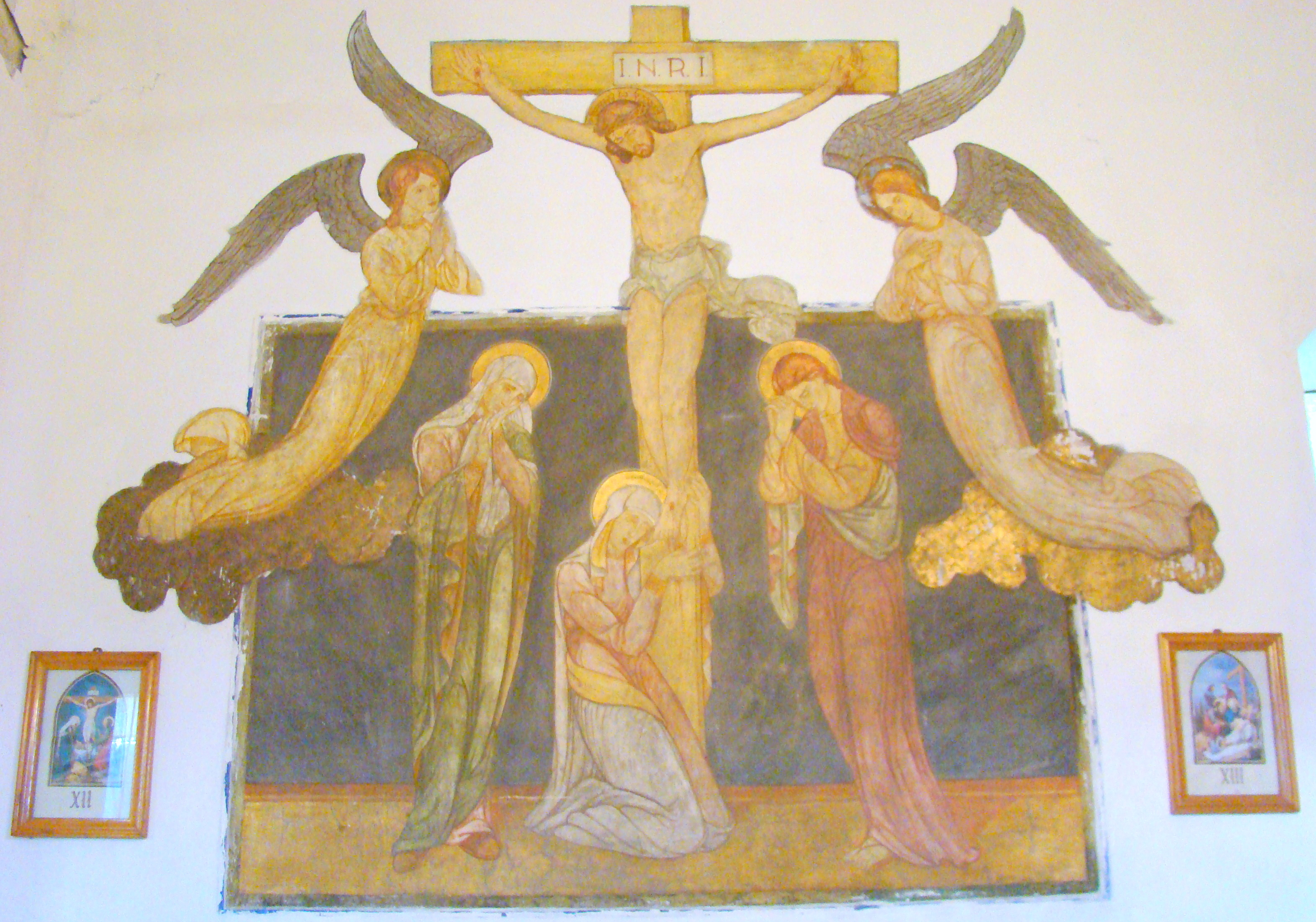 Biserica monument „Sfinții Arhangheli” din Sarasău, județul Maramureș